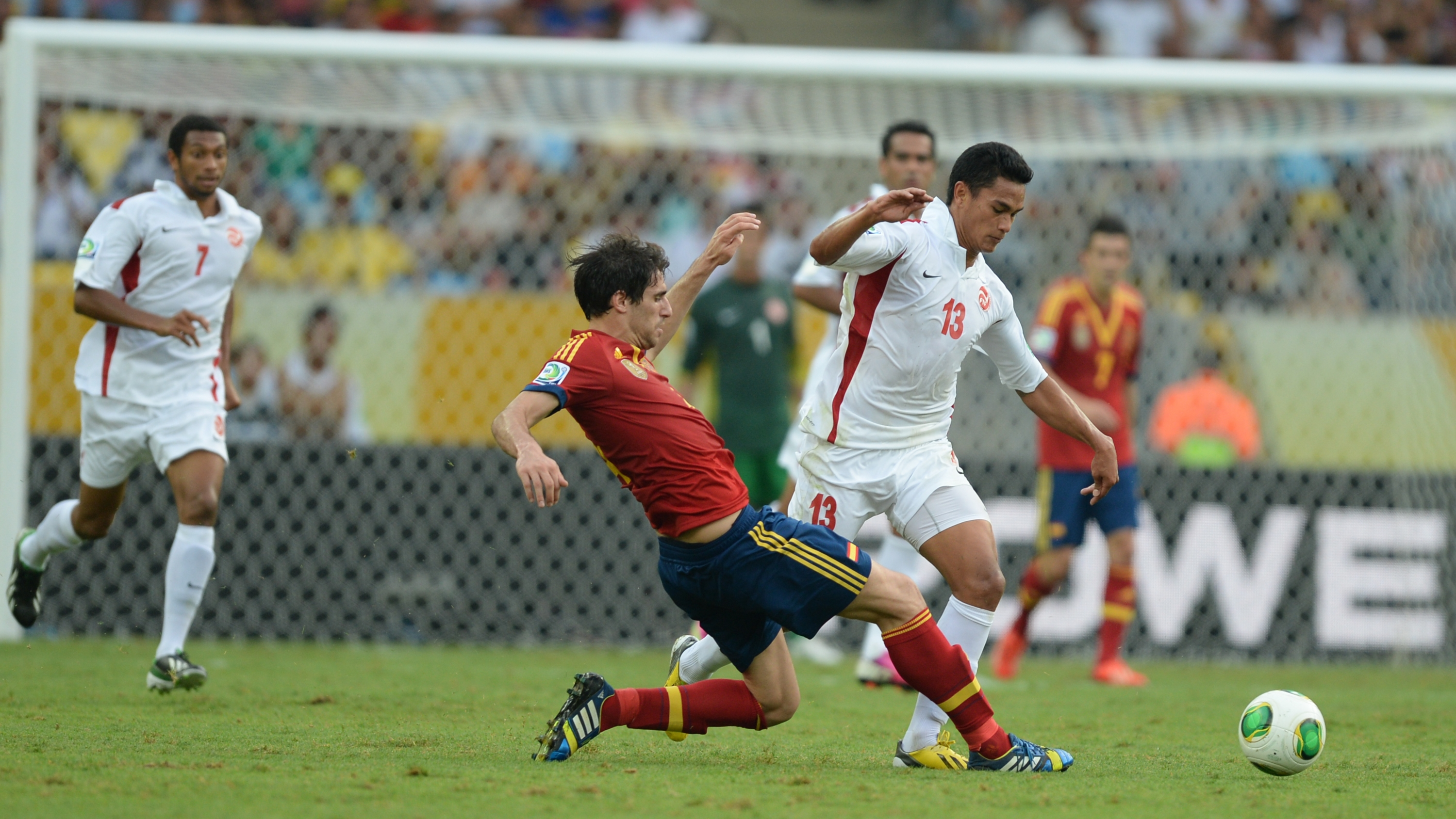 Espanha e Taiti se enfrentam na Copa das Confederações 2013